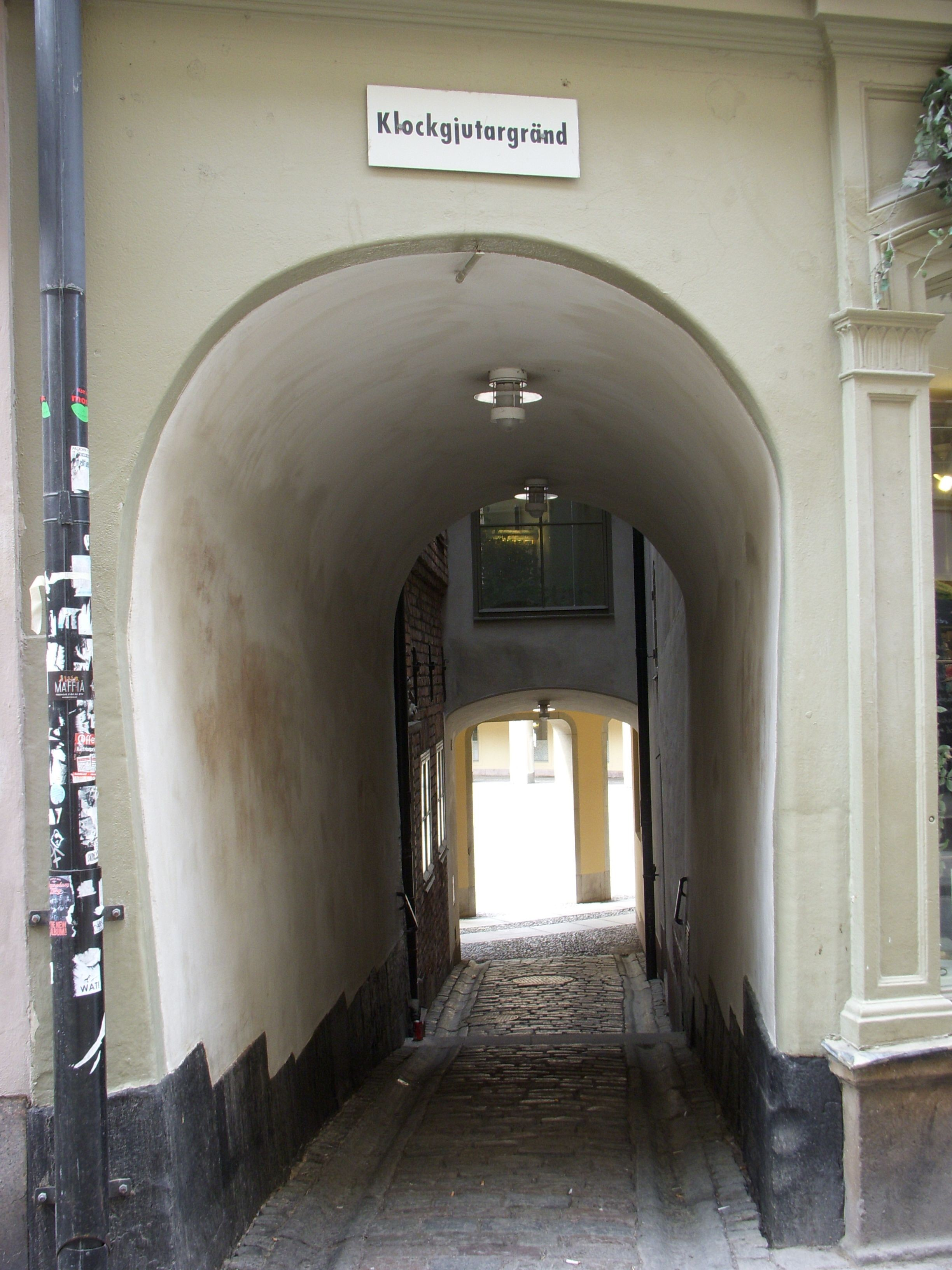 Kockgjutargränd i Gamla stan, Stockholm